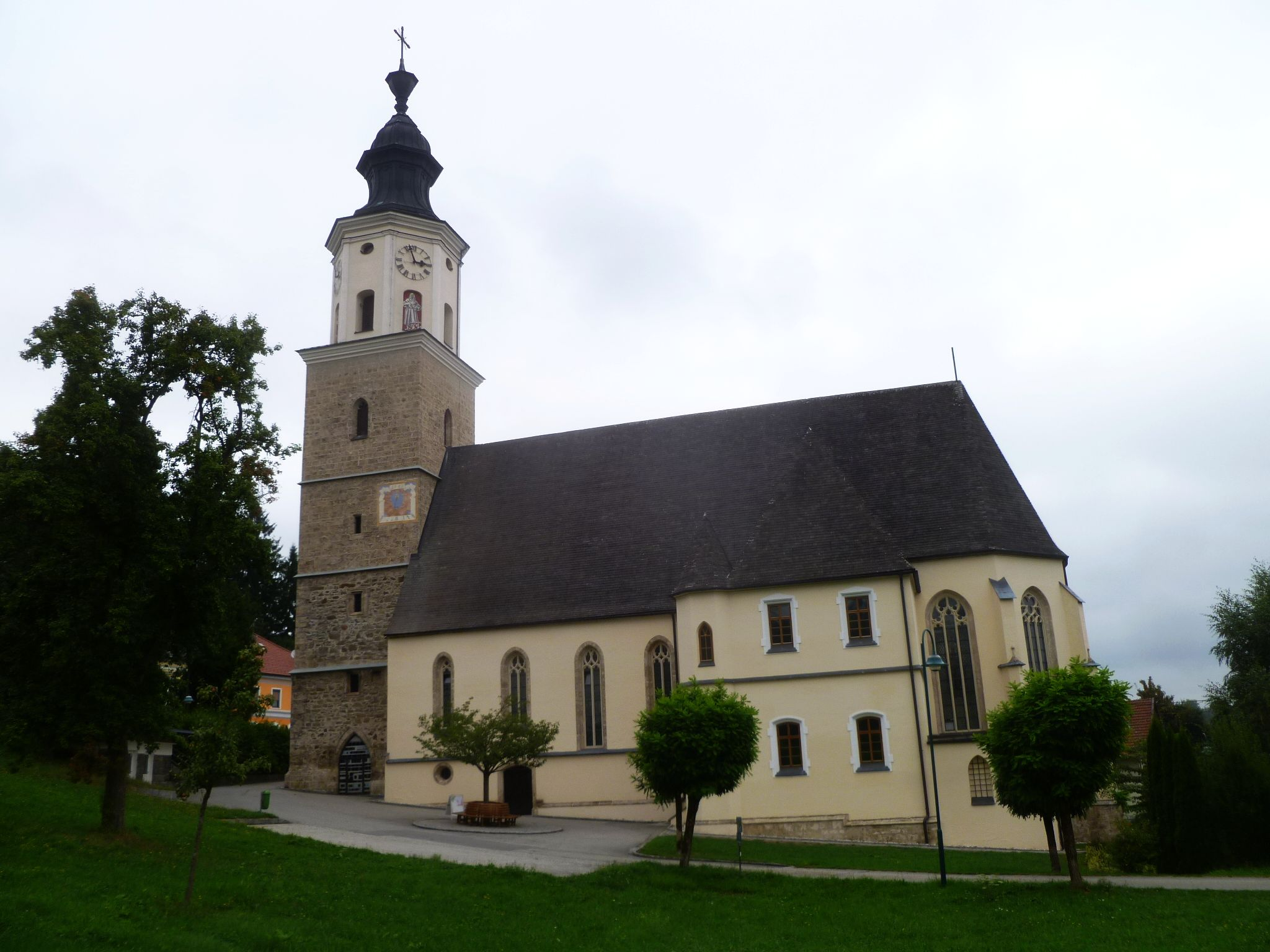 Kath. Pfarrkirche hll. Simon u. Judas